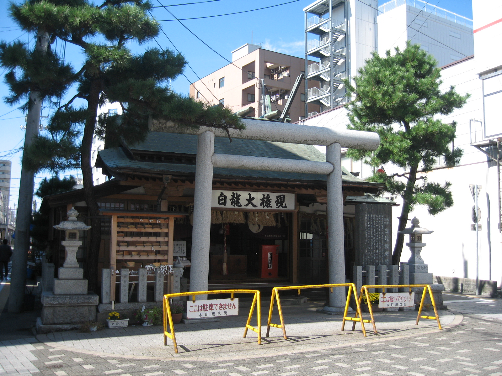 新潟県新潟市中央区。人情横丁にある白龍大権現の画像。